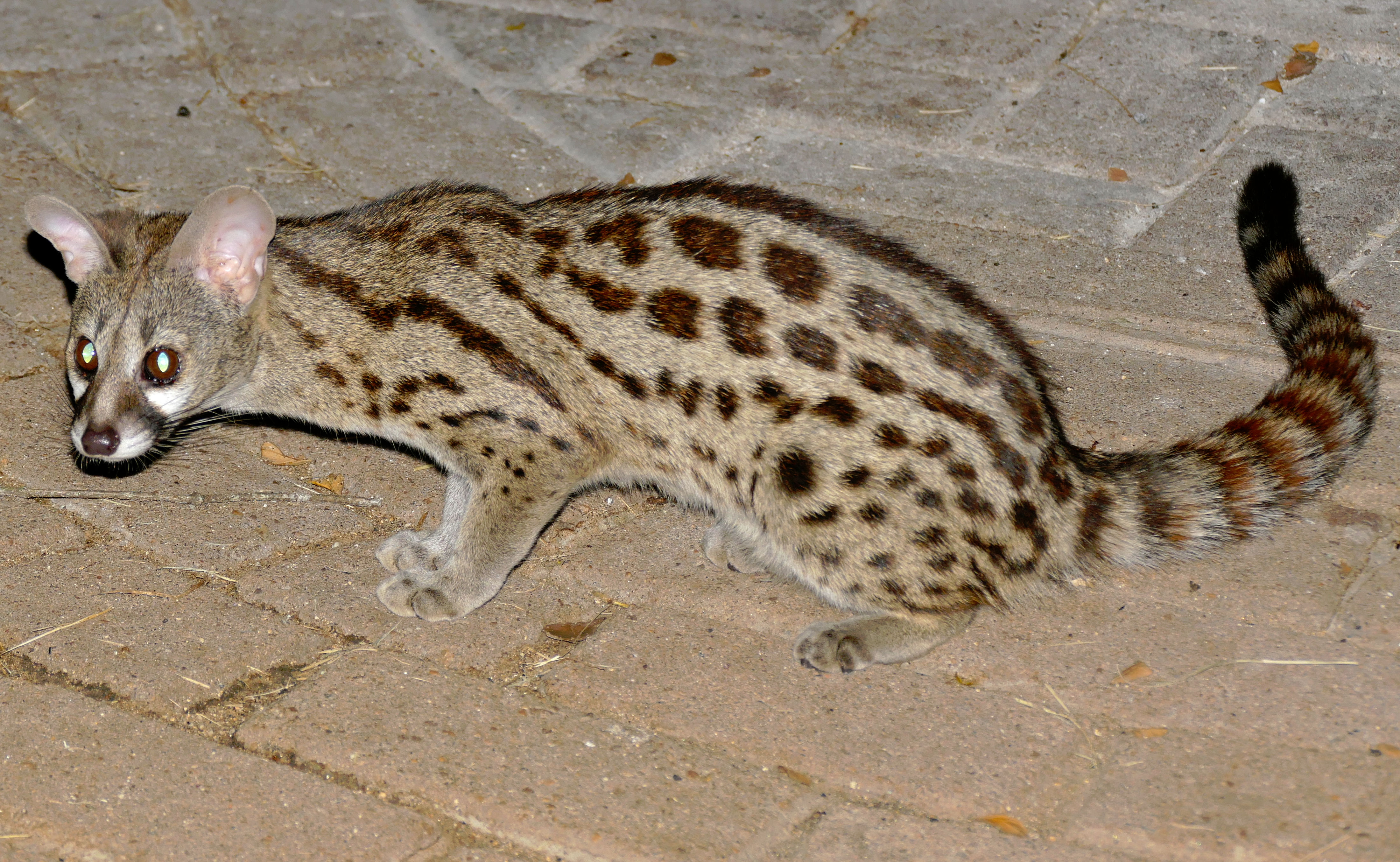 Tamboti Camp, Kruger NP, SOUTH AFRICA